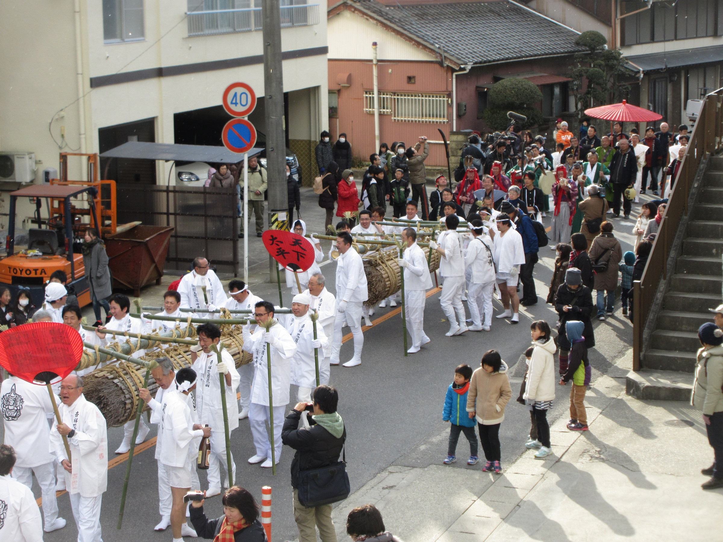 滝山寺鬼まつり（岡崎市滝町）